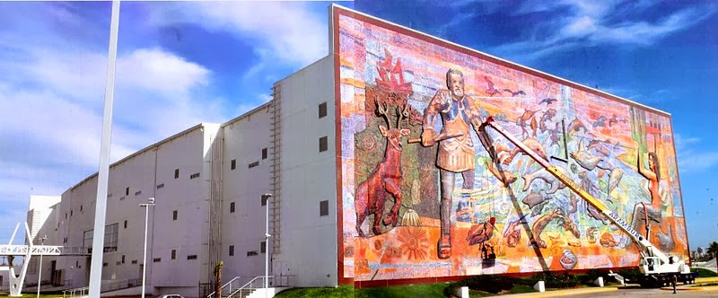 Mural Mazatlán, Sinaloa México, está en The Guinness World Records Official del año 2009